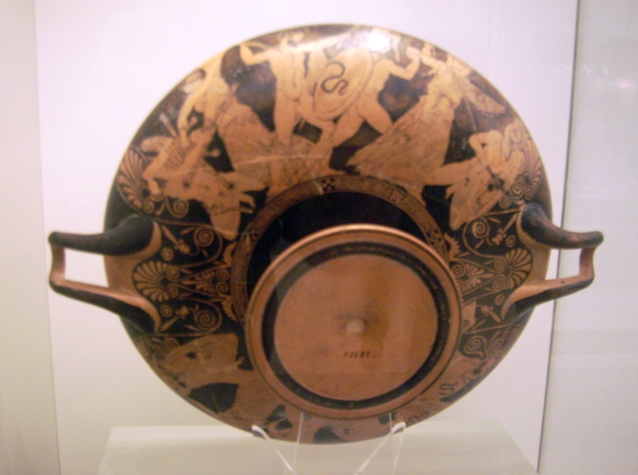 Antikensammlung Berlin/Altes Museum